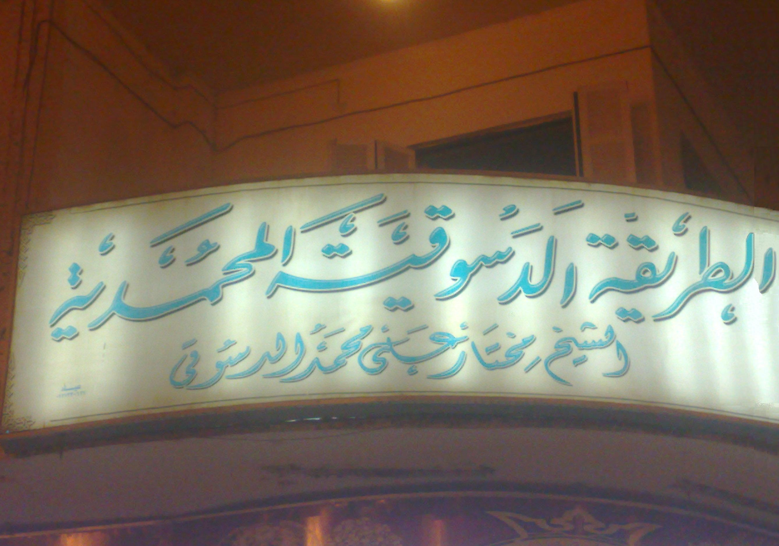 مقر الطريقة الدسوقية المحمدية بمدينة دسوق